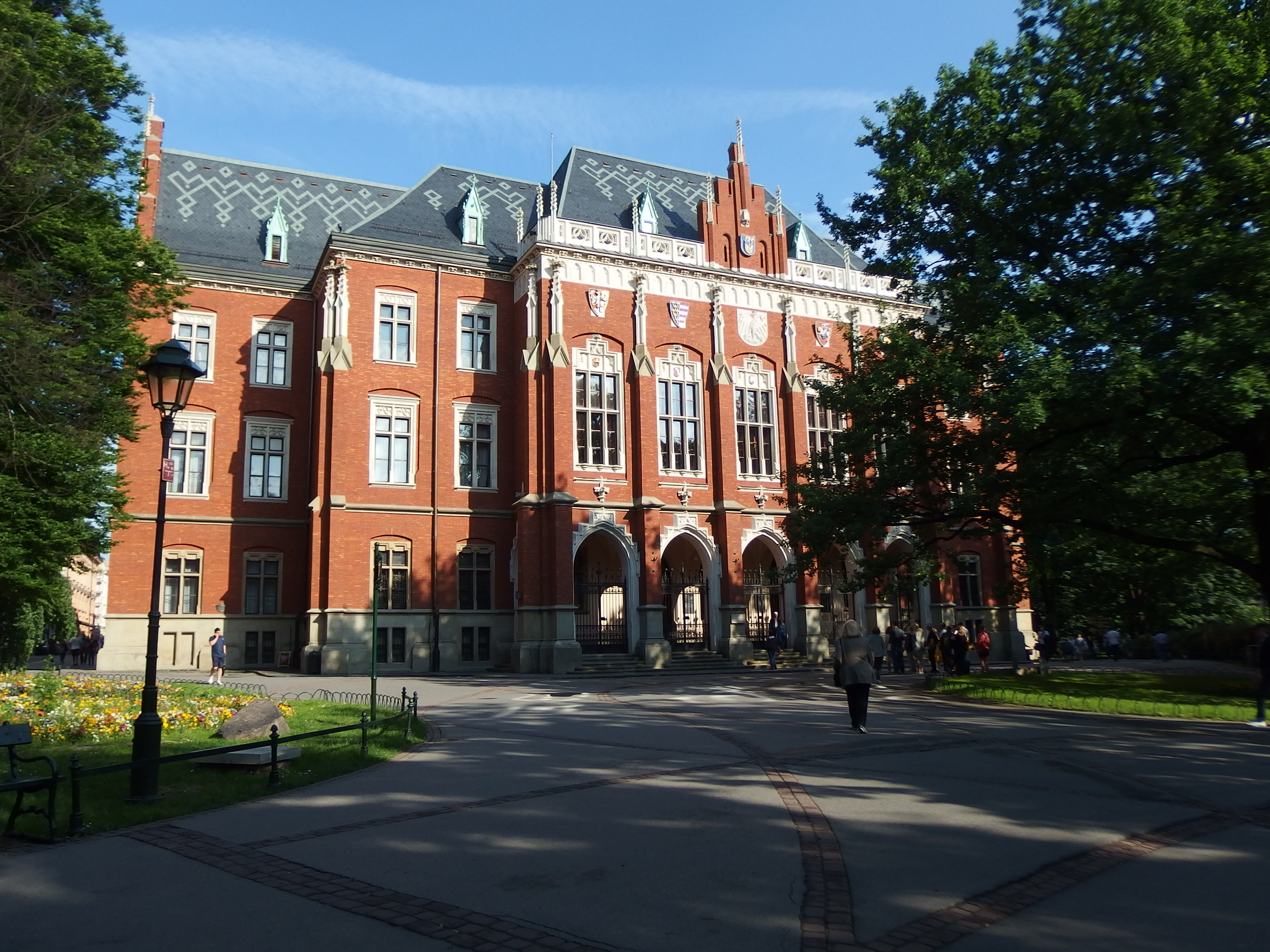 Uniwersytet Jagielloński, Collegium Novum